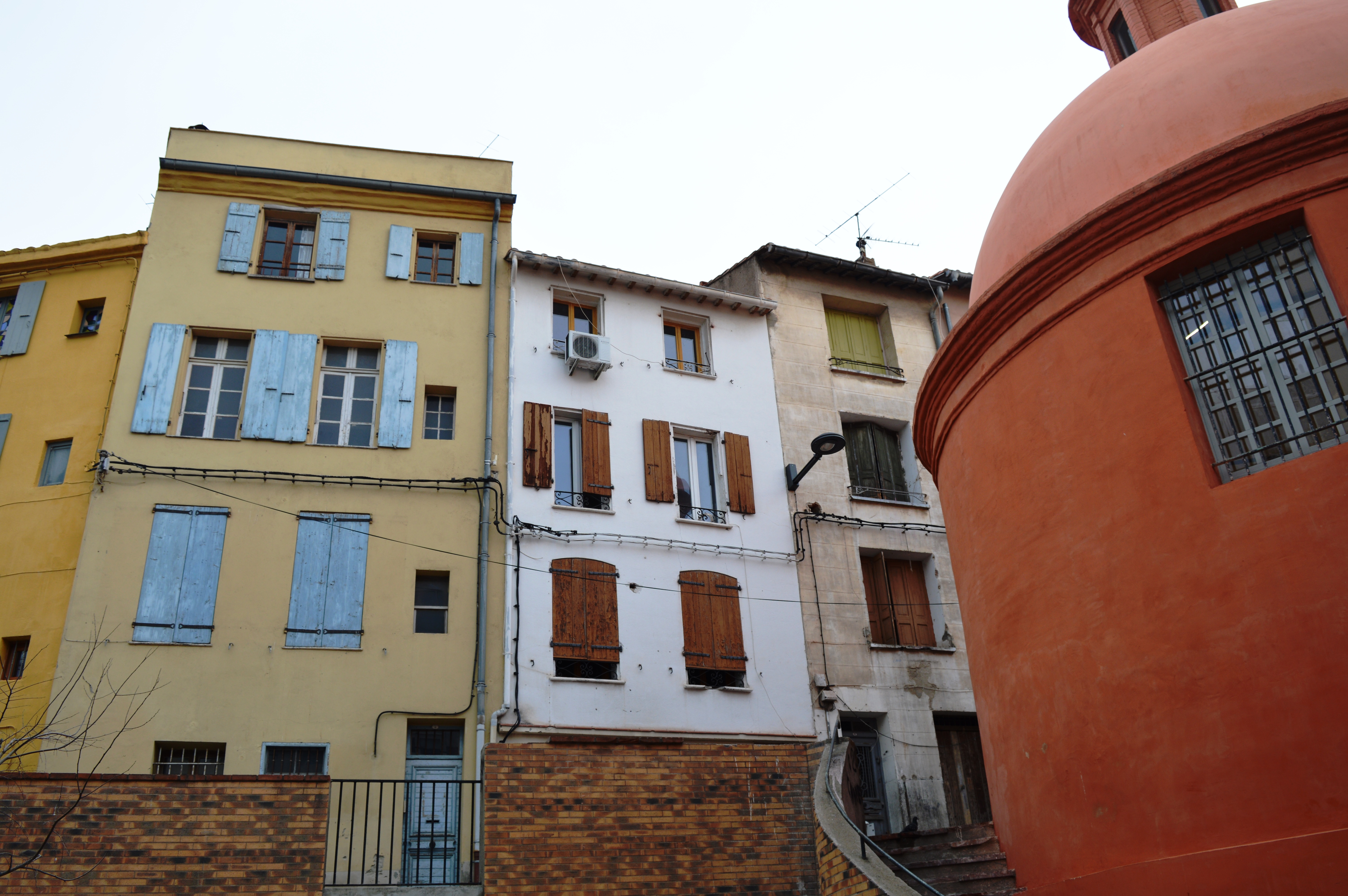 Quartier St Jacques